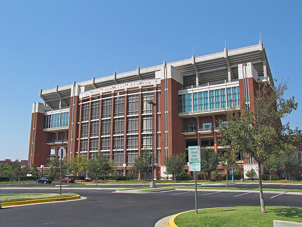 Oklahoma University - Memorial Stadium - Norman, Oklahoma